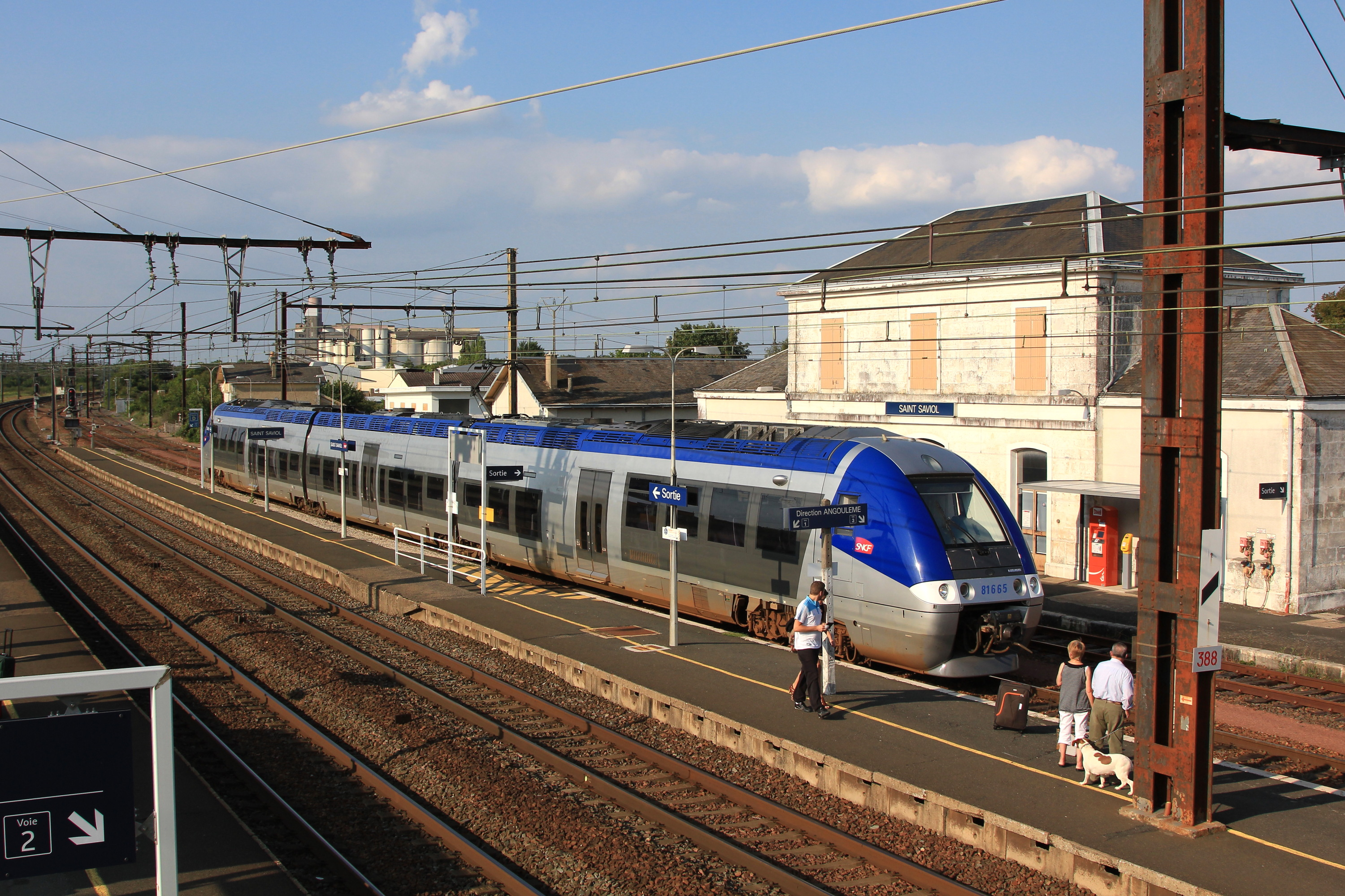 B 81665/9 sur un TER Poitiers - Angoulême s'apprête à desservir Saint-Saviol sur la voie 3 d'évitement pur laisser passer un TGV.